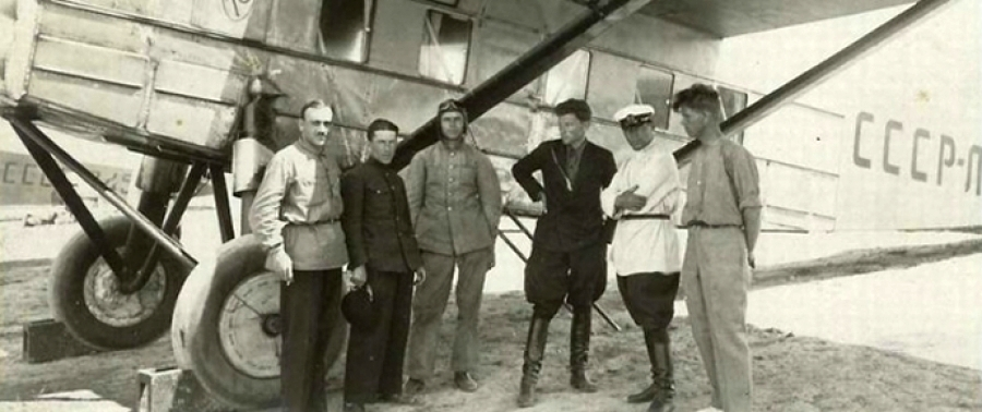 Azərbaycan aviasiyasına aid ən qədim şəkillərdən biri.